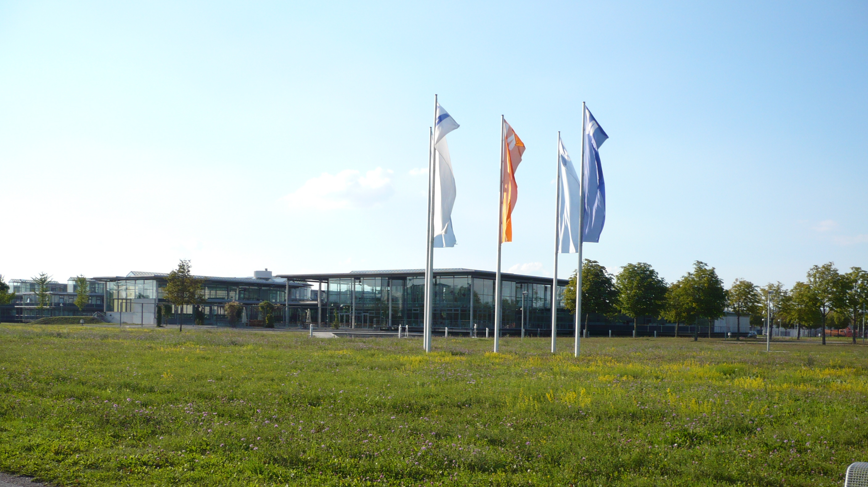 Zentrale der FMG am Flughafen München